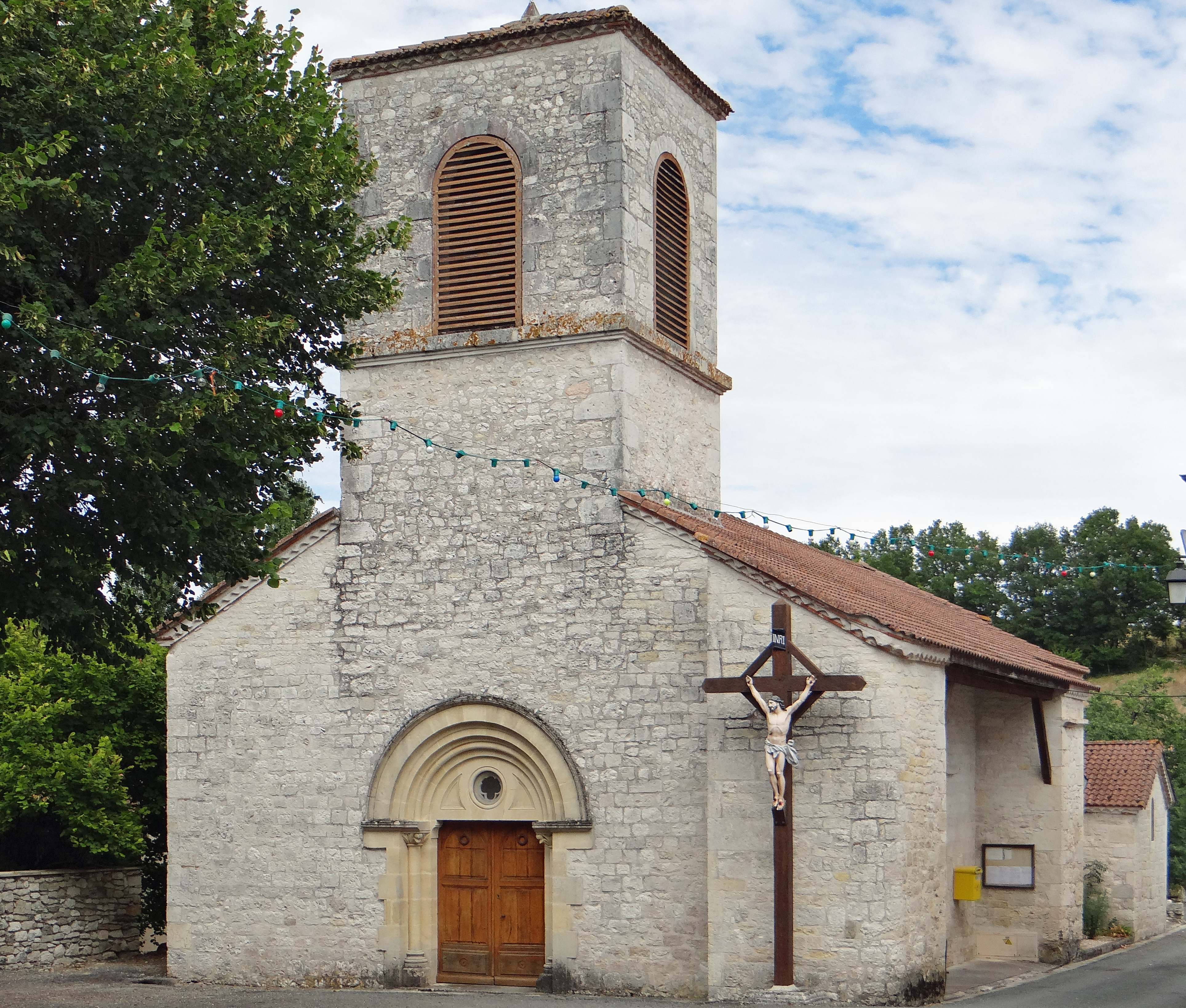 Masquières - Église Saint-Vincent - Façade et clocher